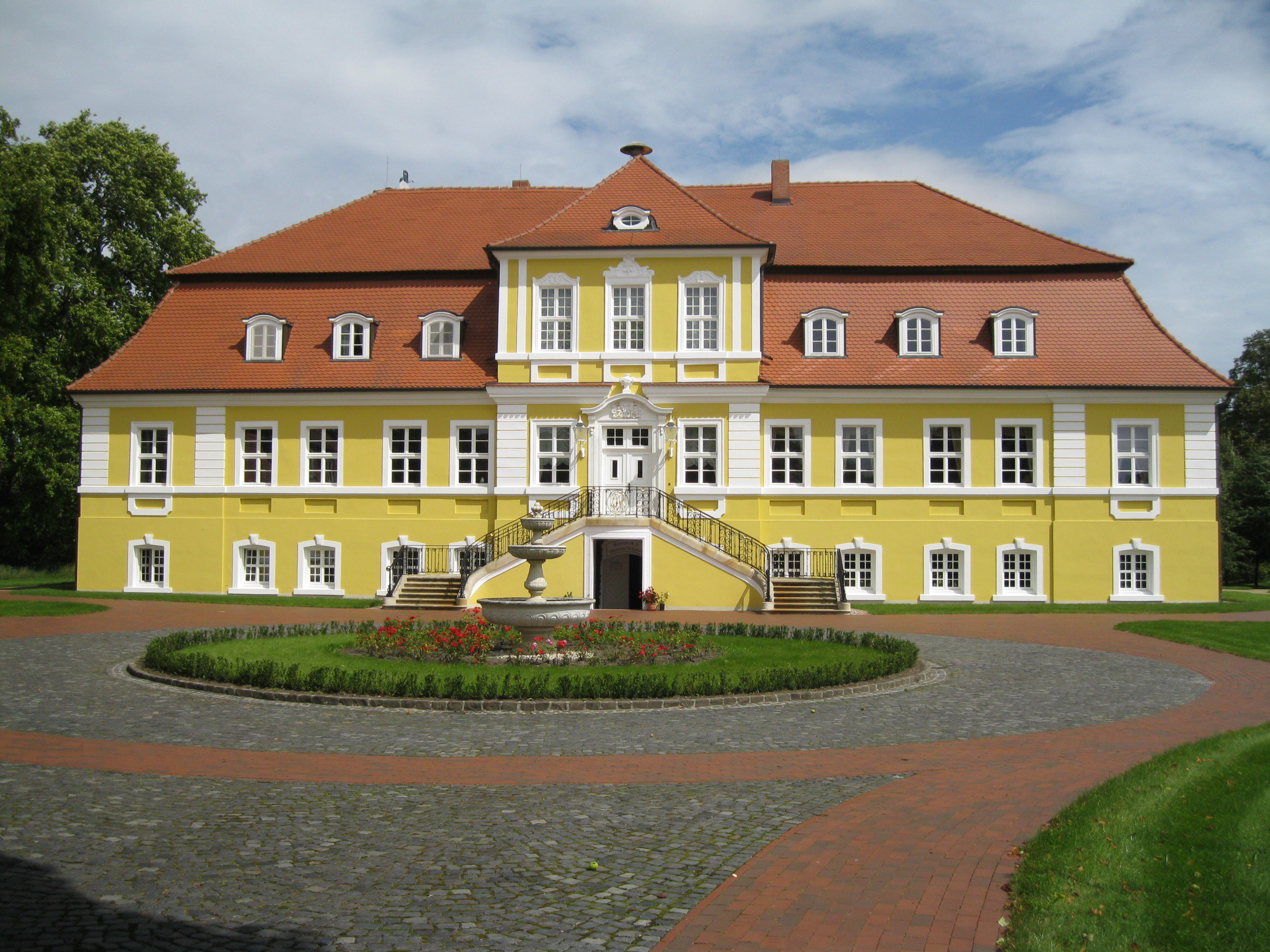 Bismarckschloss Döbbelin